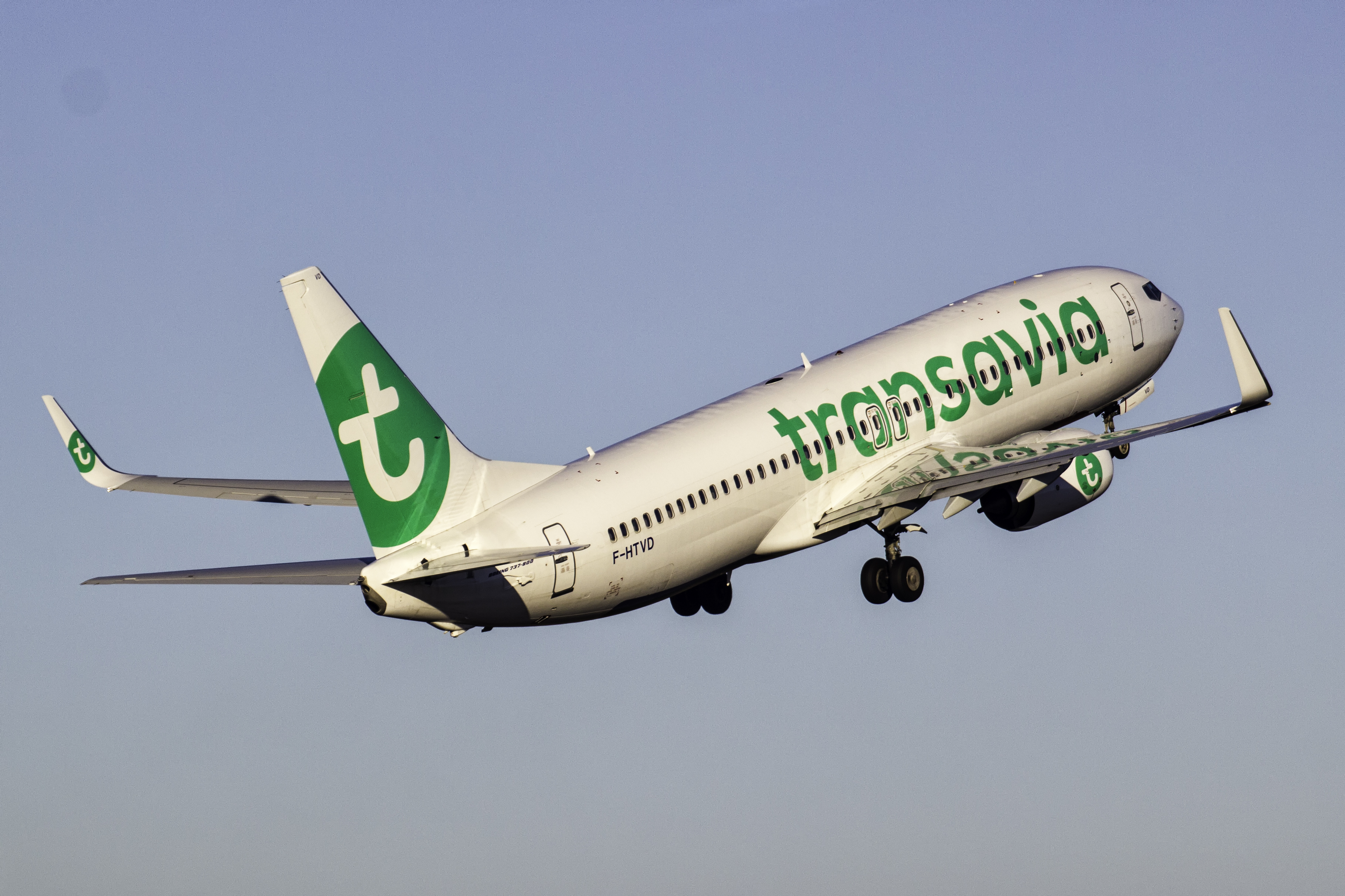 Boeing 737 de Transavia France despegando do aeroporto do Porto.